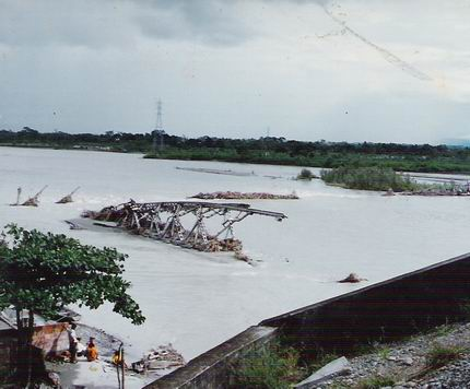 Foto personal, río Magdalena, Colombia, en el Huila, donación para wikipedia (Albeiro Rodas)